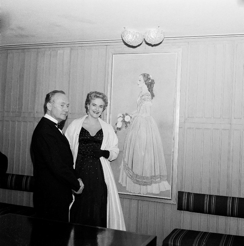 Nybroplan, Dramaten, lilla scenens foajé. Tavla föreställande Inga Tidblad som Kameliadam. I bild konstnären själv, Einar Jolin med sin fru sångerskan Tatjana Angelini. Bildnummer SvD 31142 Unikt dokument ID SSMSVD031142 Uppladdat från Stockholms Stads Digitala Stadsmuseum.